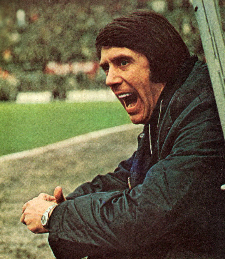 L'allenatore italiano Cesare Maldini sulla panchina del Milan, allo stadio San Siro di Milano, nella stagione 1973-74.